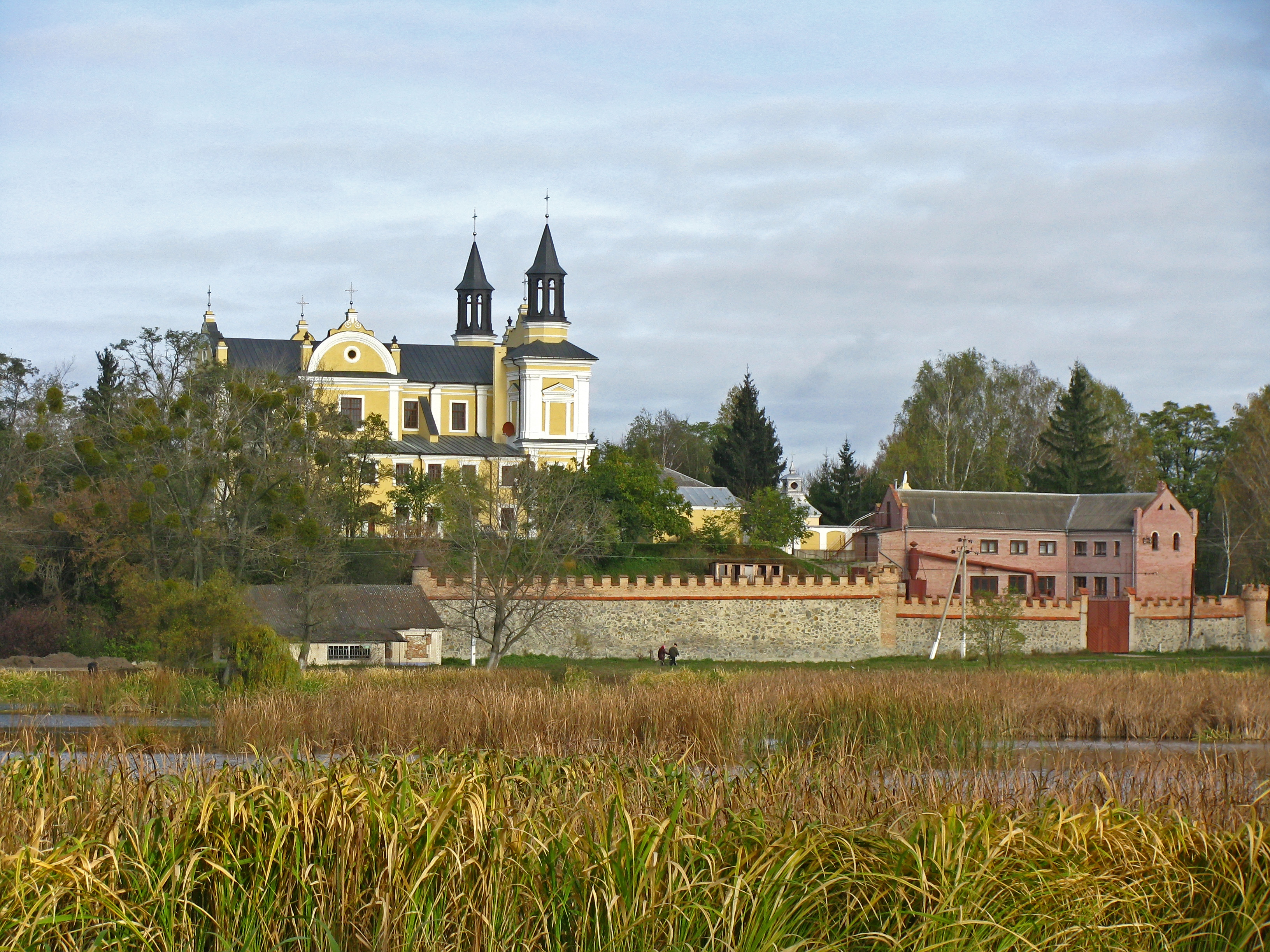 Костел Св.Ганни (мур.) Полонне